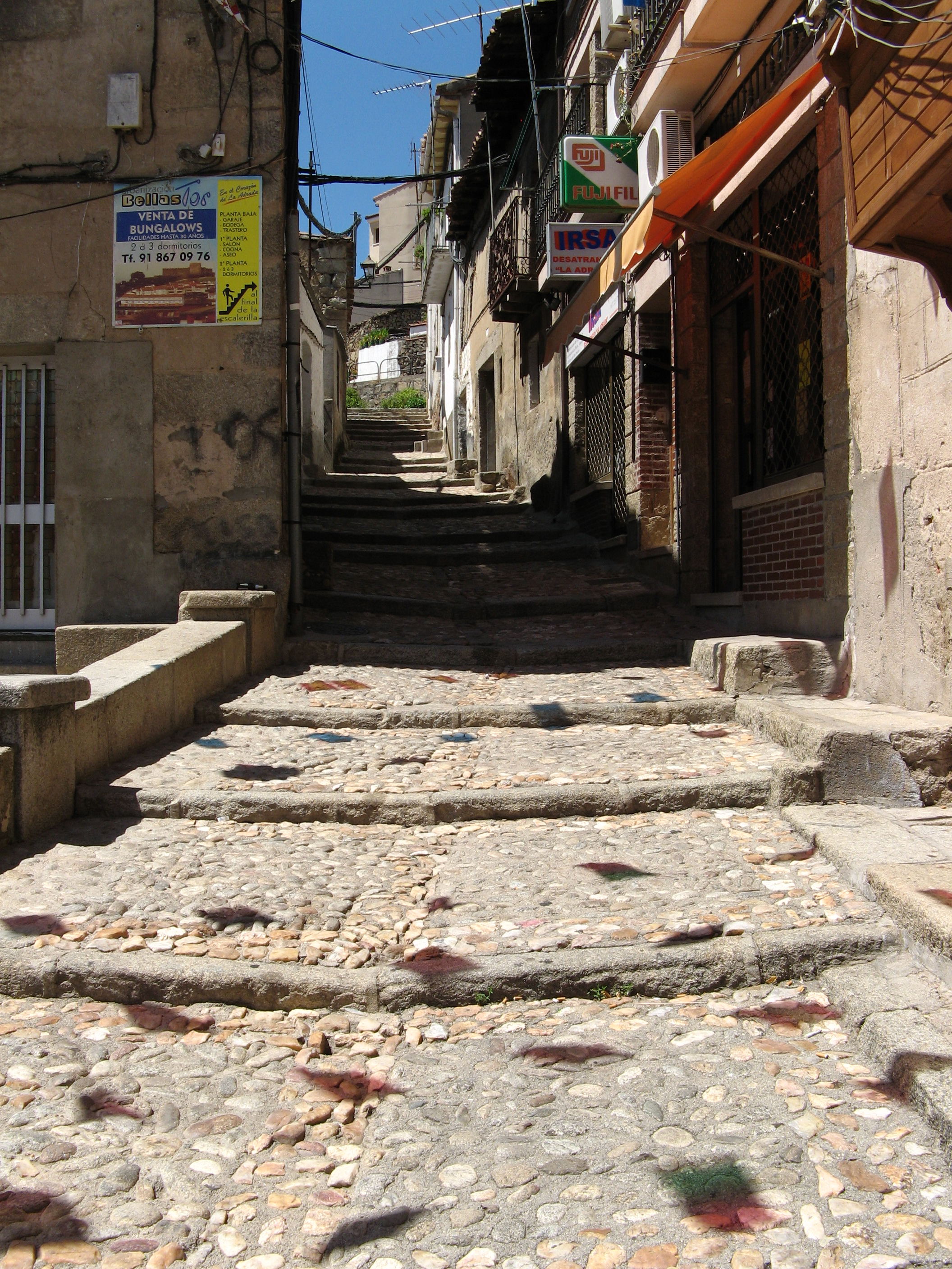 Las escalerillas. La Adrada Provincia de Ávila Castilla y León. España